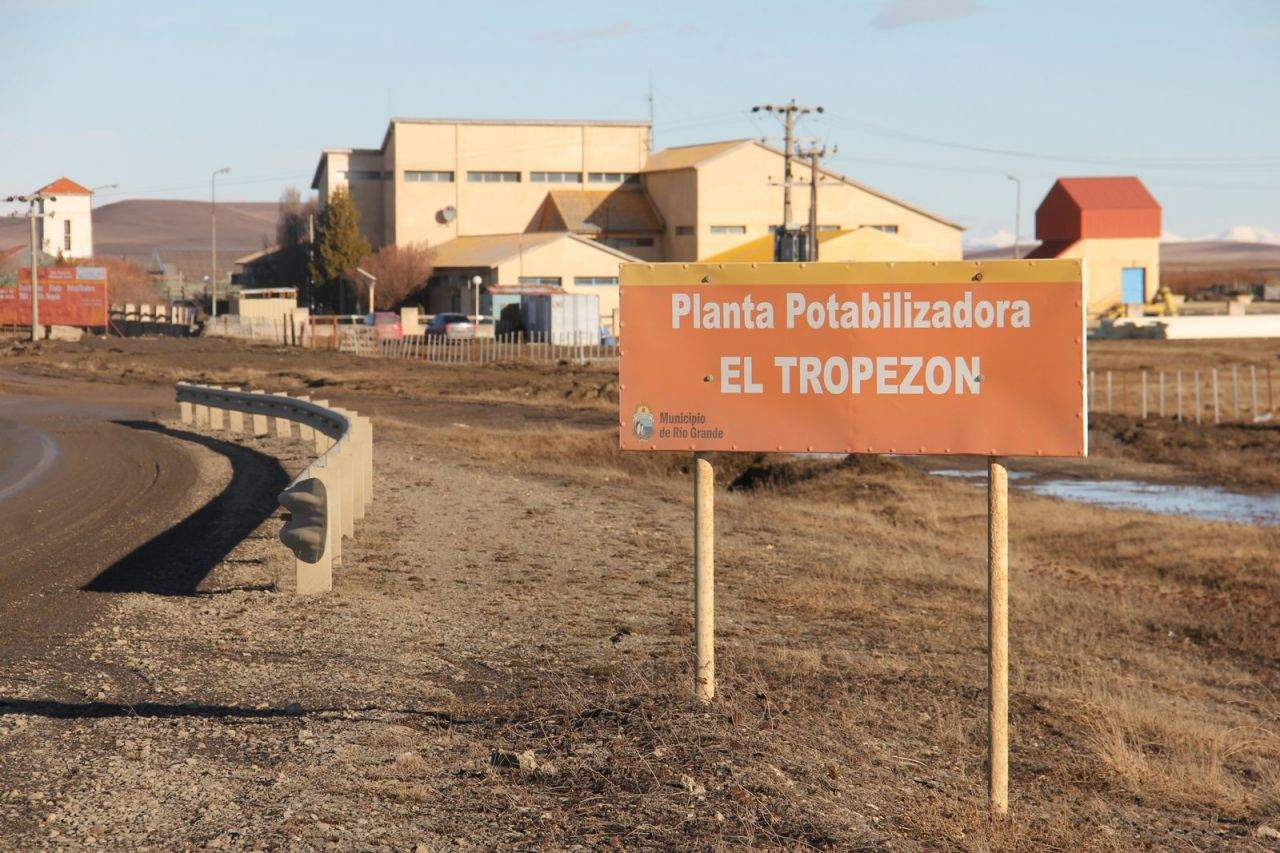 Foto de la planta potabilizadora de la ciudad de Río Grande